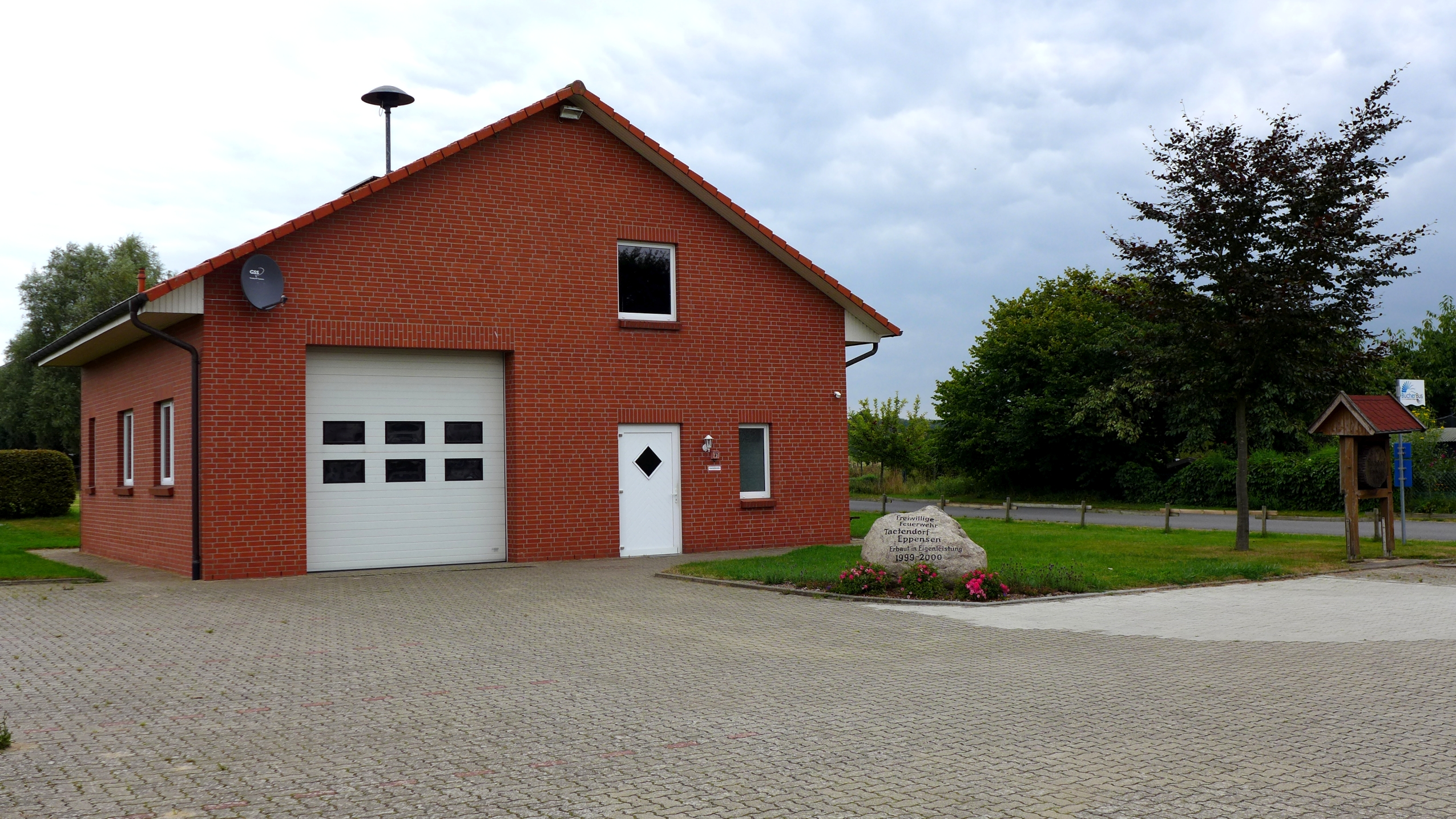 Gerätehaus der Freiwilligen Feuerwehr Tätendorf-Eppensen. Gründungsjahr 1934. Tätendorf-Eppensen ist ein Ortsteil von Barum im Landkreis Uelzen. Aufnahmedatum 2016-09.